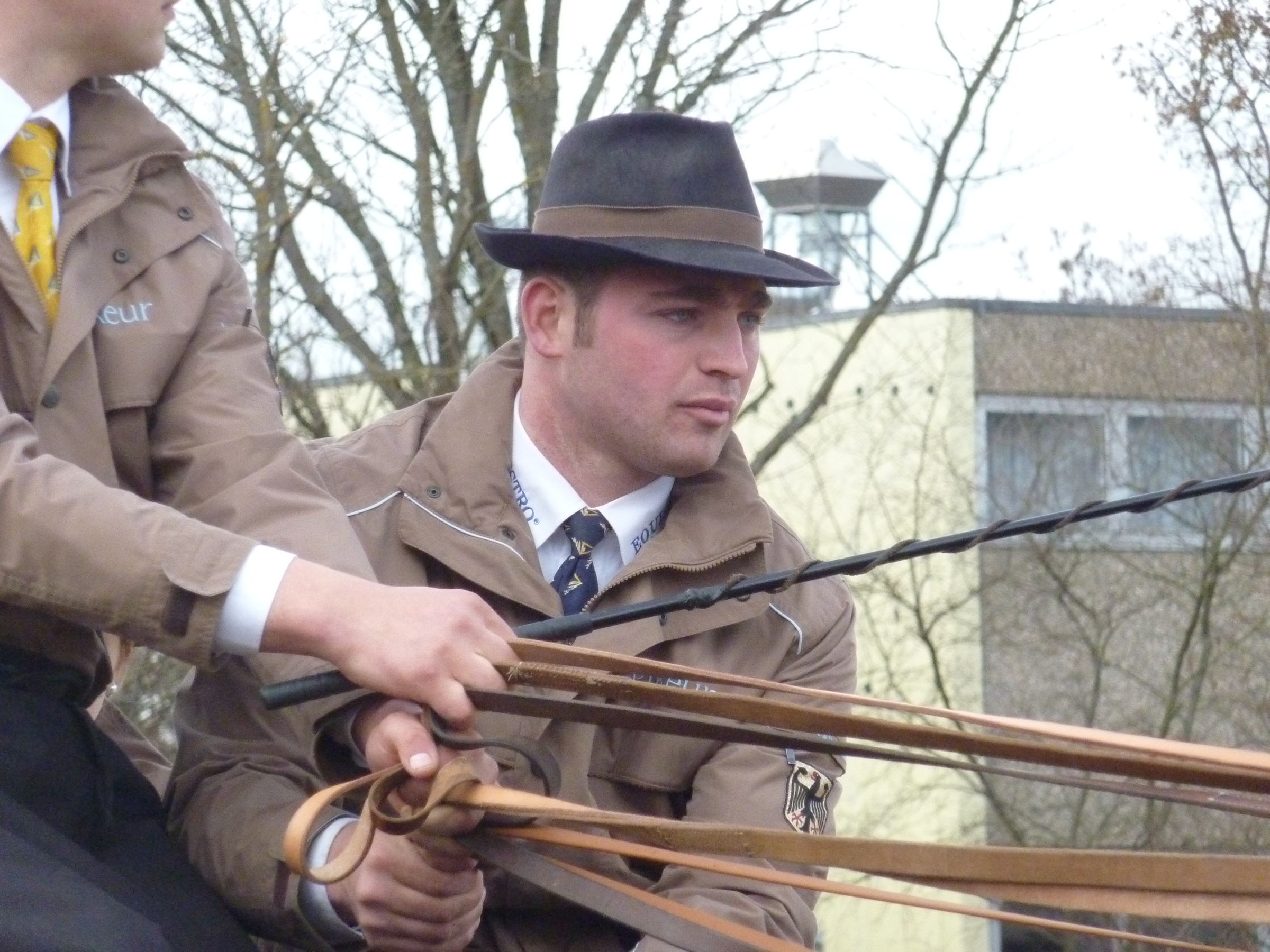 Pferdemarkt Bernhausen 2014